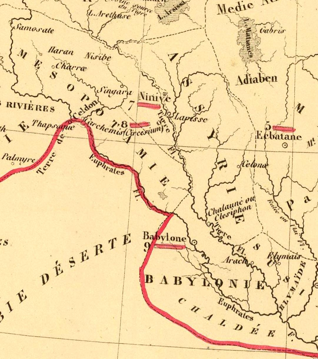 Carte de l'Empire des Perses. Pour servir a l'intelligence des livres d'Esdras, de Nehemias, de Tobie, de Judith, d'Esther, de Job et des Prophetes. Depuis 588 jusqu'a 536 avant J.C. epoque ou finit la captivite. Dressee sous la direction de A. Houze. (In upper margin:) Atlas histque. (et) geogque. de la Terre Sainte. Carte VIII. (Paris, Chez P. Dumenil, editeur, rue des Beaux-Arts, 10. 1844)